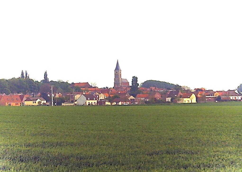 Prise de vue du village de Bugnicourt